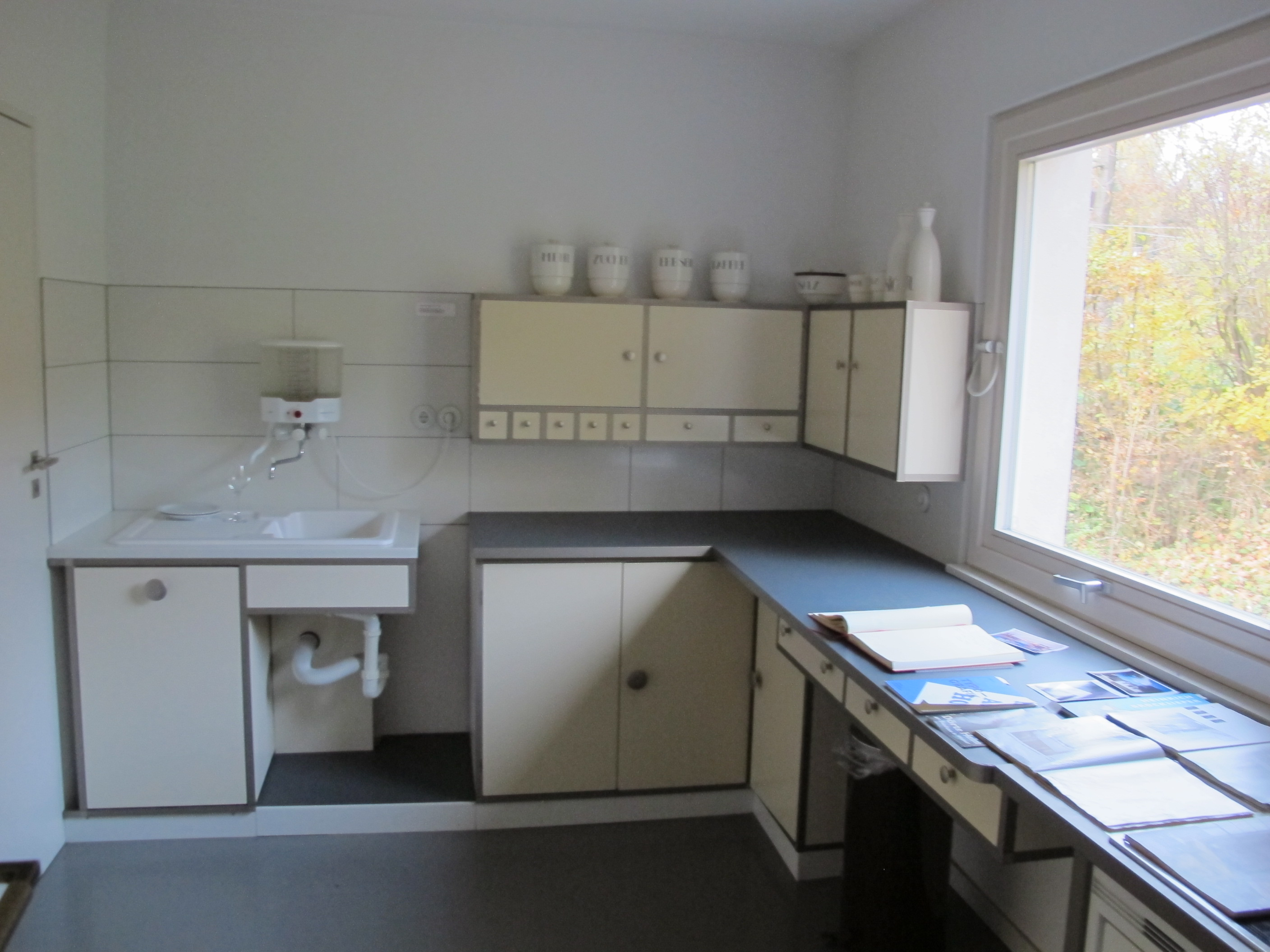 Haus am Horn, interior, küche